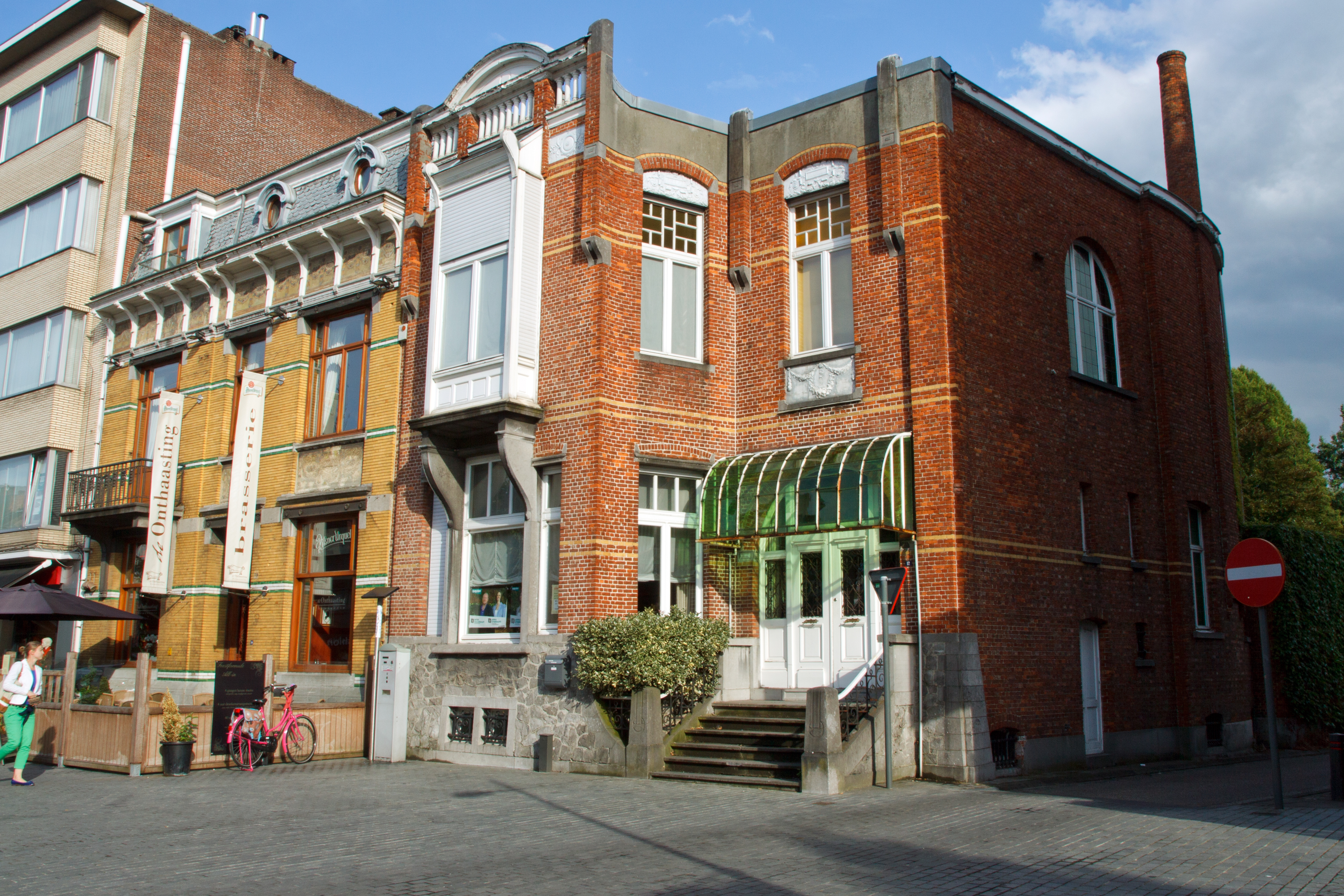 Rechts op de foto het eclectisch burgerhuis aan het Laar 12 en links op de foto het burgerhuis aan het laar 14 te Mol-Centrum.